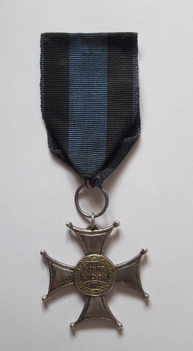 VM rewers